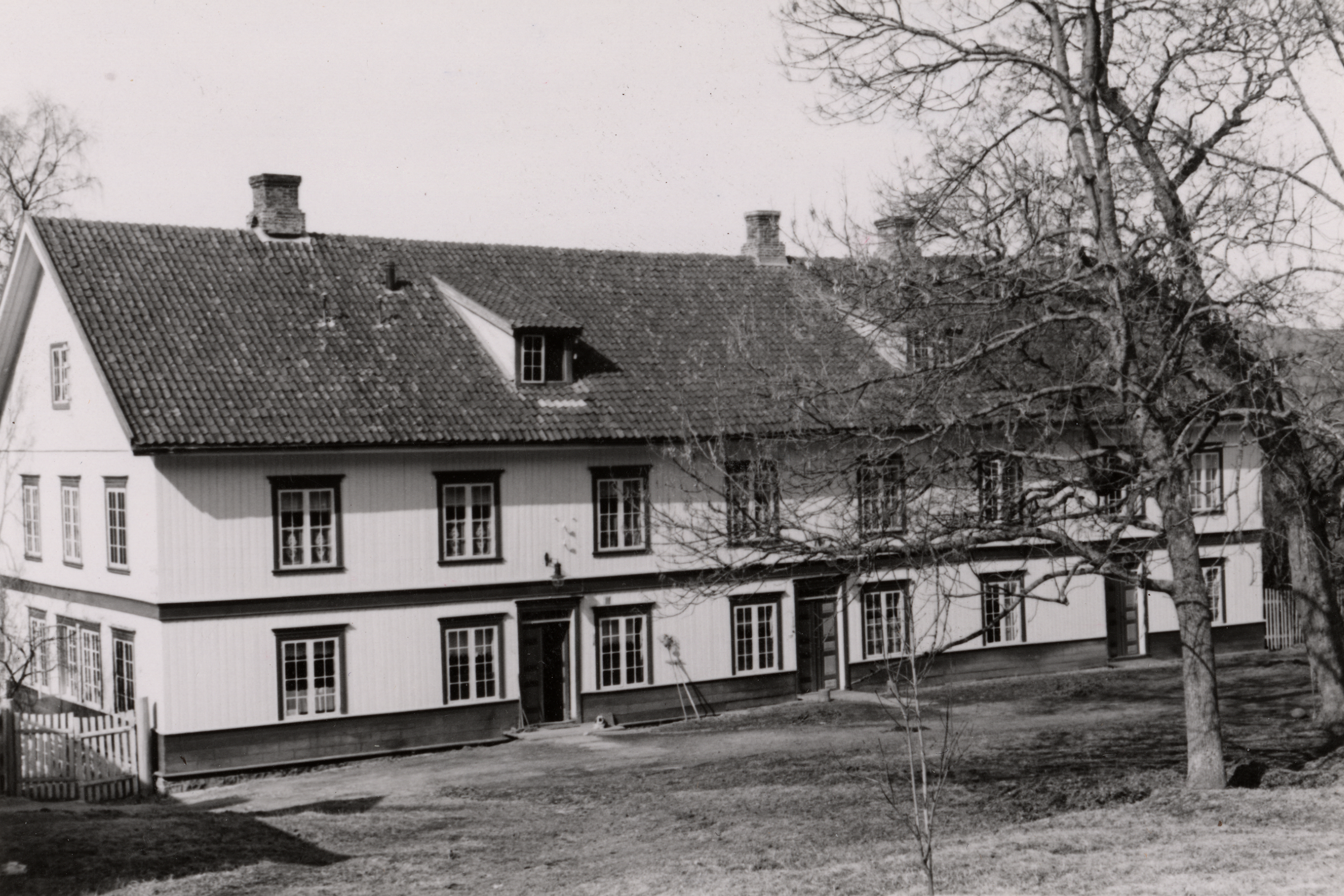 Lysgård i Mesna, Oppland This image on crowdsourcing geotagging platform Fotodugnad